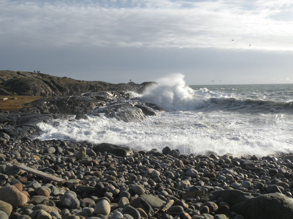 På Mølen ligger et gravfelt med minst 230 gravrøyser og steinlegninger. Her en storrøys ut mot havet.